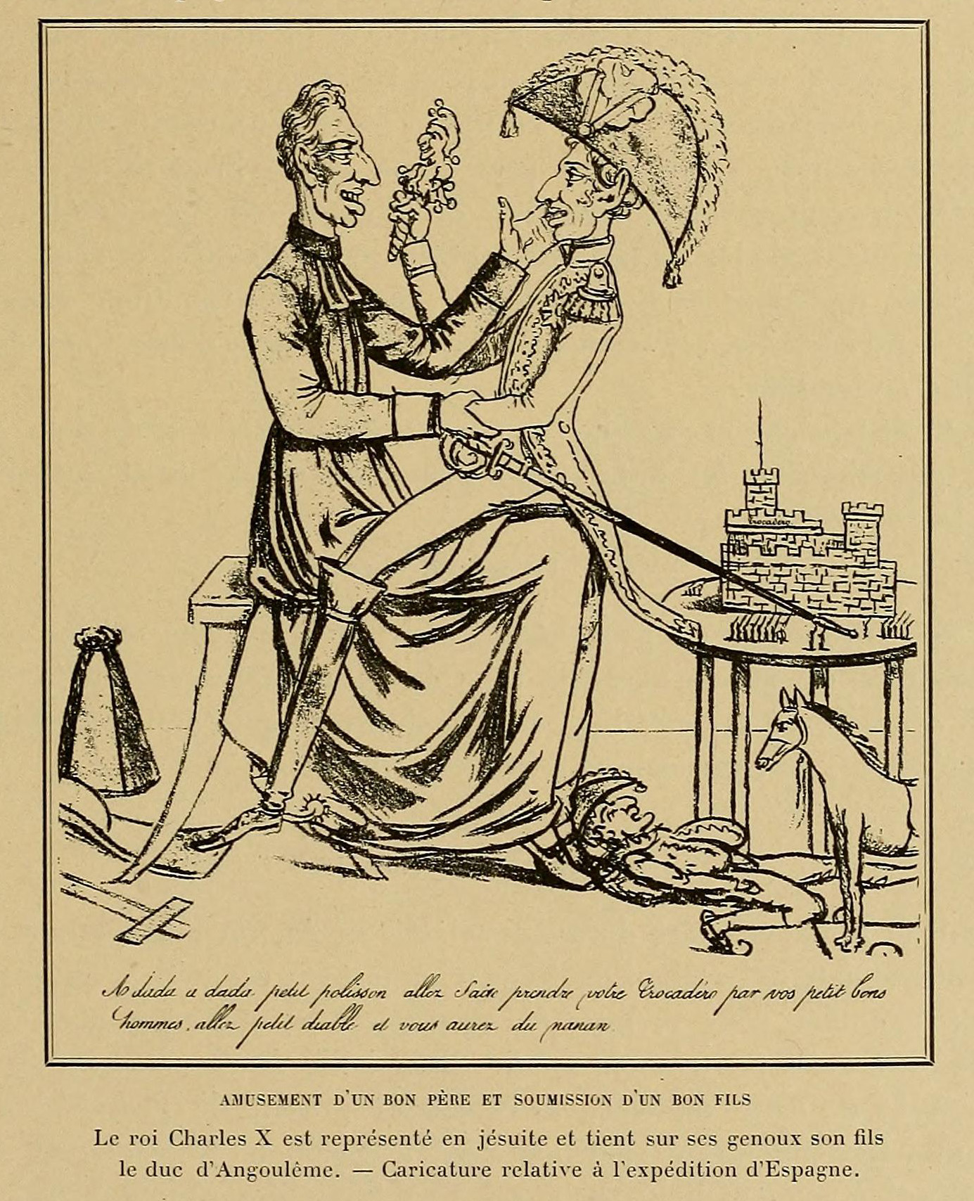 Illustration from Histoire des jouets